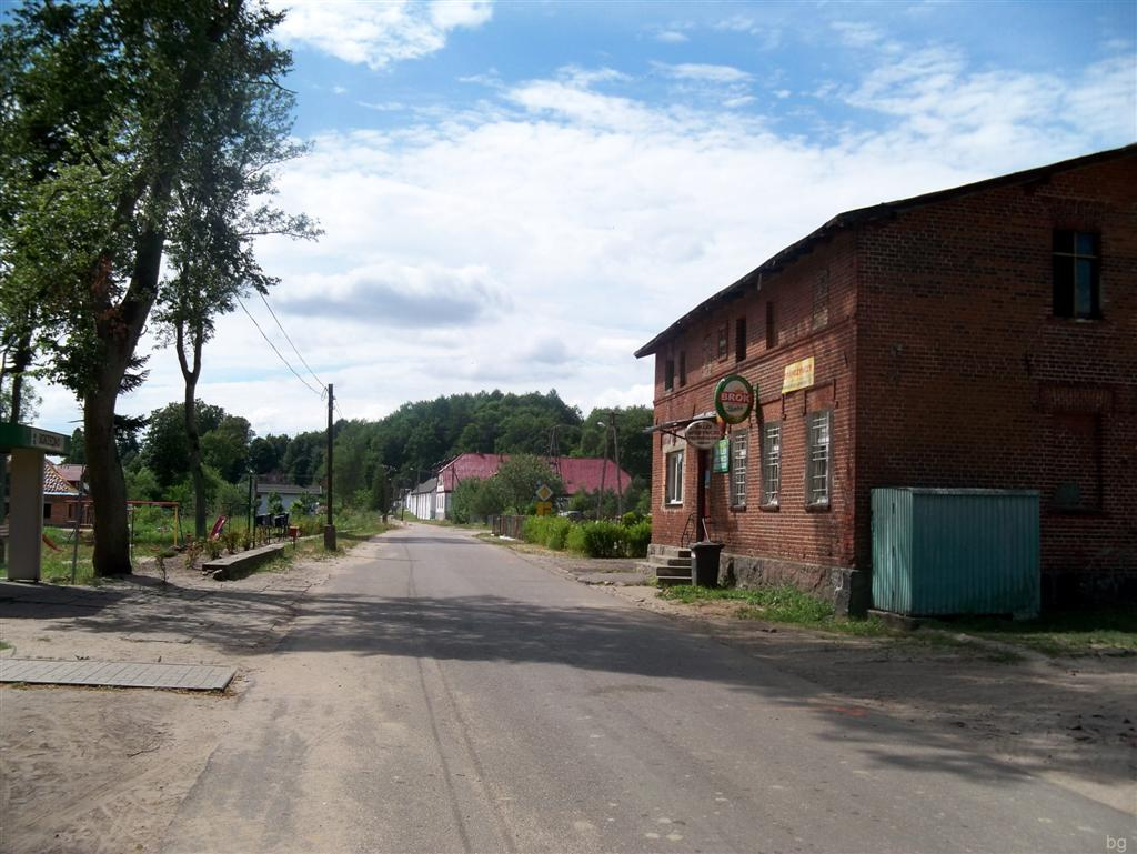 Borzęcino Gmina Barwice